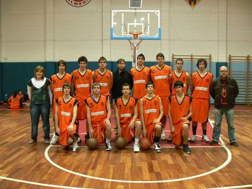 Basquet Almeda